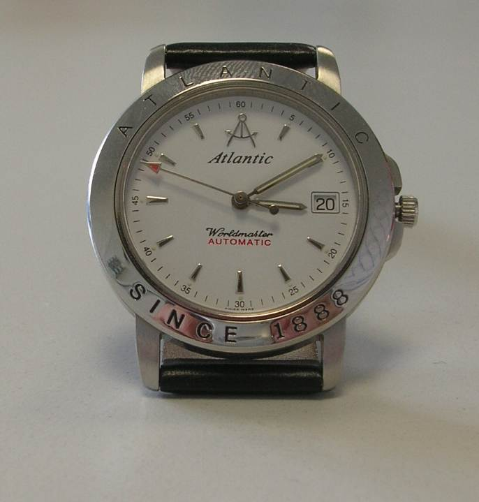 Bild einer Atlantic-Automatikuhr